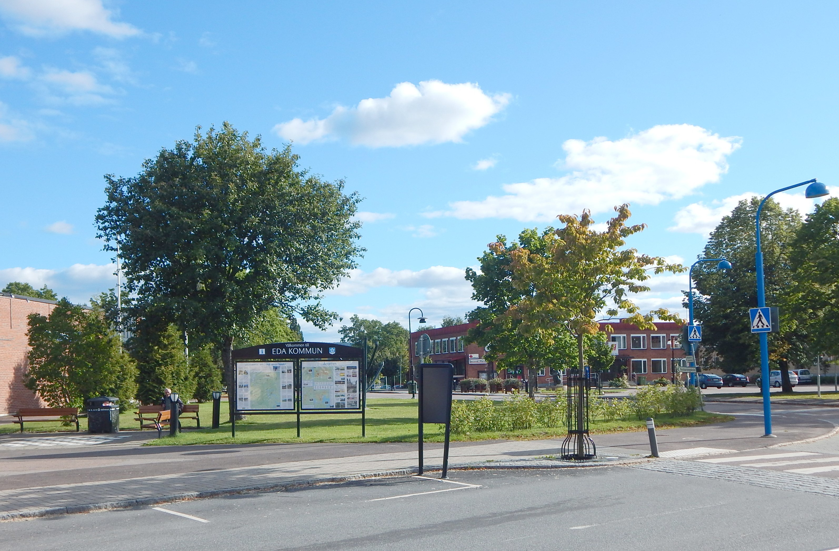 Åmotfors sentrum